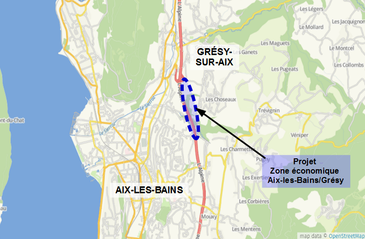 Carte du projet de la zone économique entre Aix-les-Bains et Grésy-sur-Aix pour 2018.